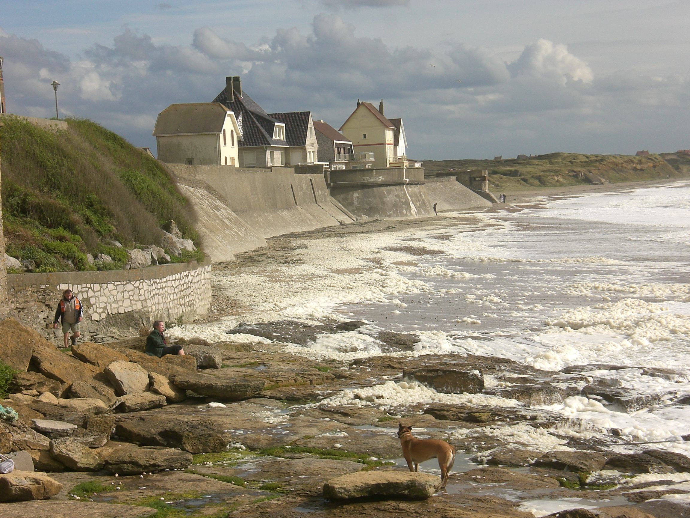 Littoral d'Audresselles avec les habitations qui longent la côte, protégées de la Manche par des perrés, en grande partie privés, construits par les propriétaires riverains à la fin du XIXe siècle. Audresselles est une petite commune très jolie au sud du Cap Gris-Nez dans le Pas-de-Calais.